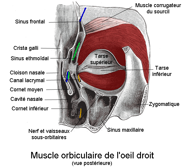 Muscle orbiculaire de l'oeil. Vue postérieure. Anatomie humaine.